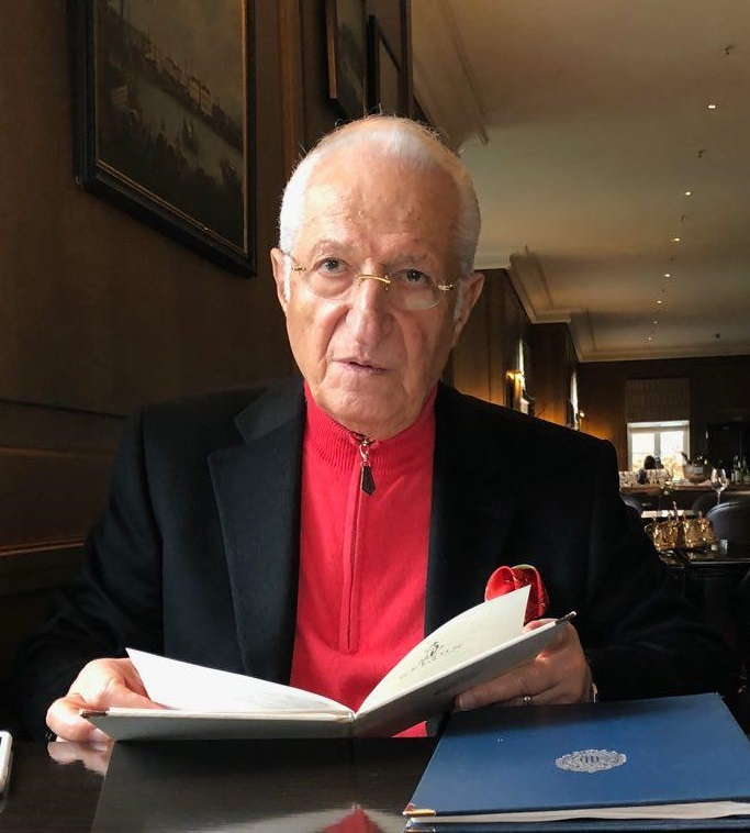 پزشک ایران